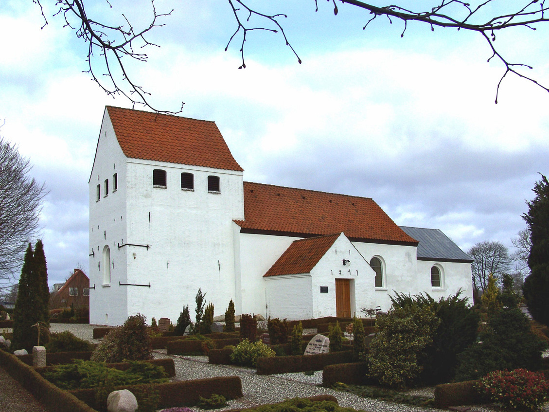 fra sydvest